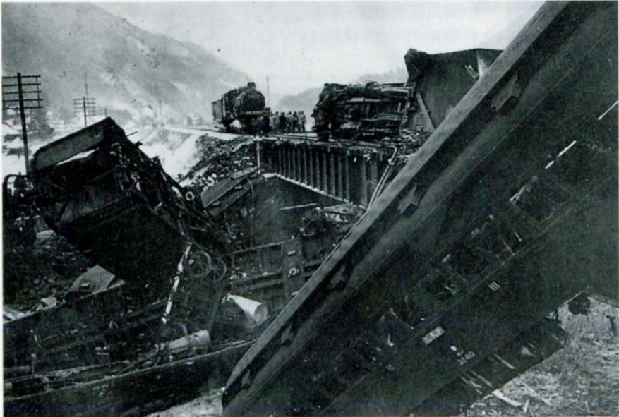 1931年1月12日に発生した山陽線急行列車脱線事故の現場、河内駅東方の椋梨川鉄橋。奥は救援機関車。『決定版昭和史 第6巻』(毎日新聞社、1984年)では手前の客車の車番はオハ32410と読み取れる。 毎日フォトバンクによれば、この写真は東京本社1月13日朝刊、大阪本社同日夕刊に掲載された。